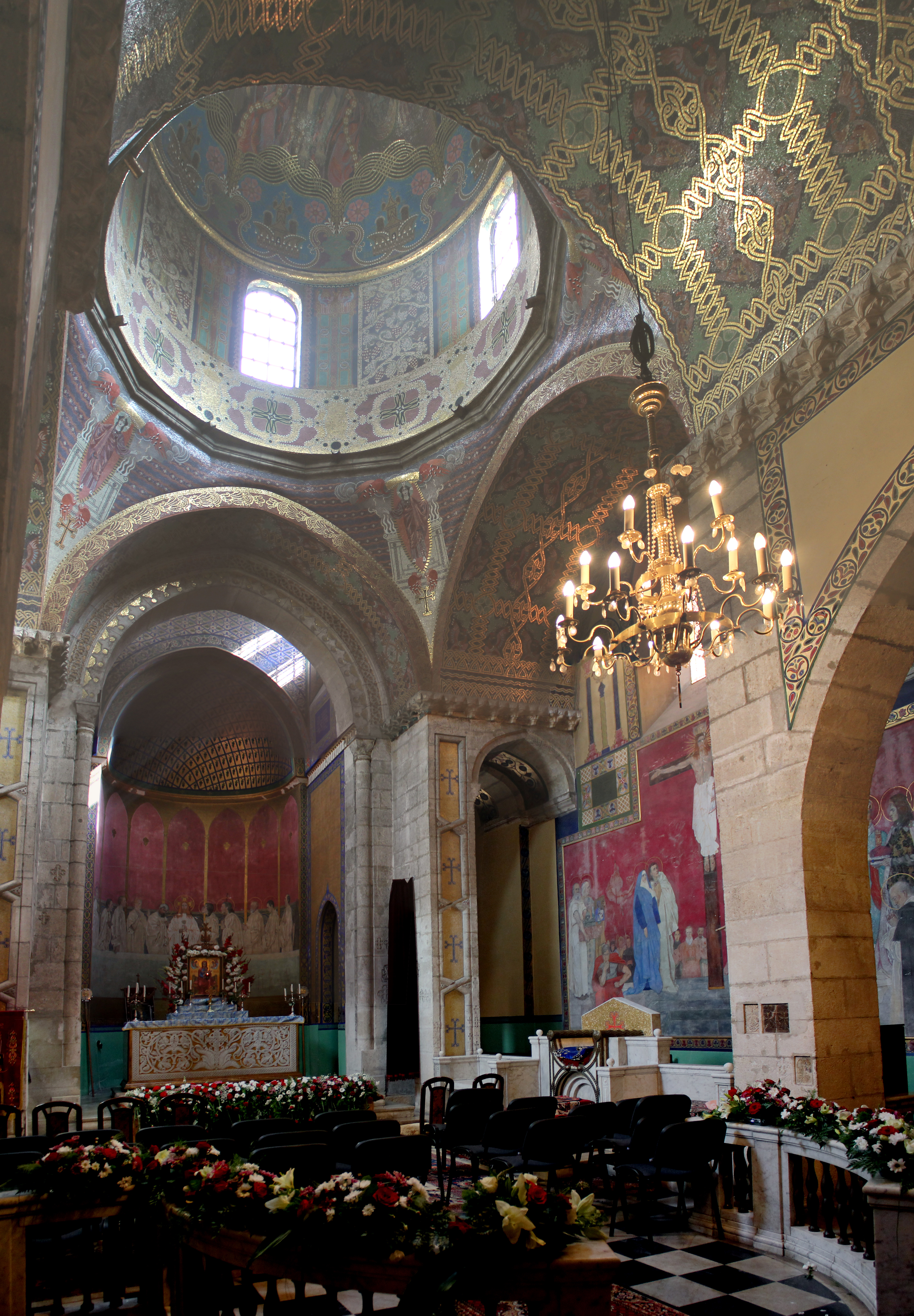 Вірменський собор Св.Трійці, вул. Вірменська,7, м.Львів